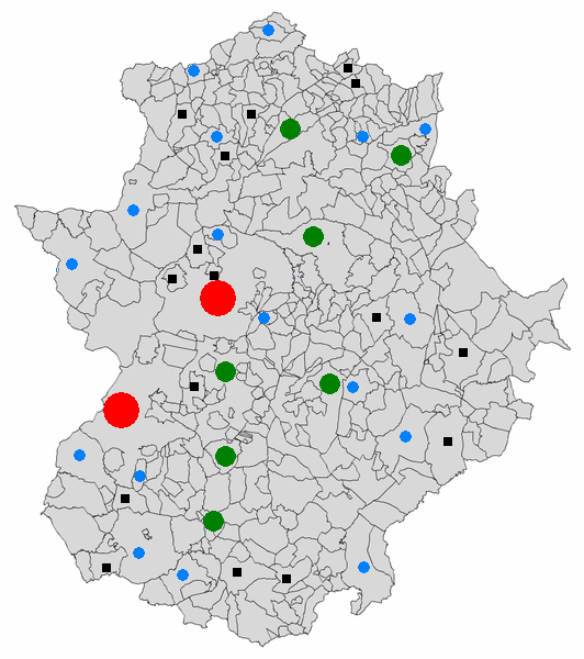 Los puntos rojos señalan núcleos de Primer Nivel, los verdes, de cuato nivel, los azules, de tercer nivel, y, los negros de segundo nivel.